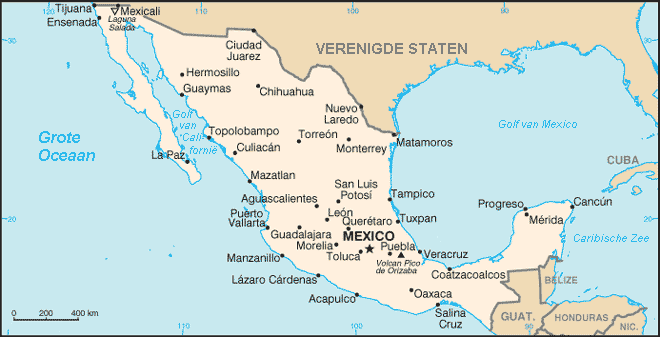 mexico van duitse wiki Categorie:Afbeelding CIA Factbook